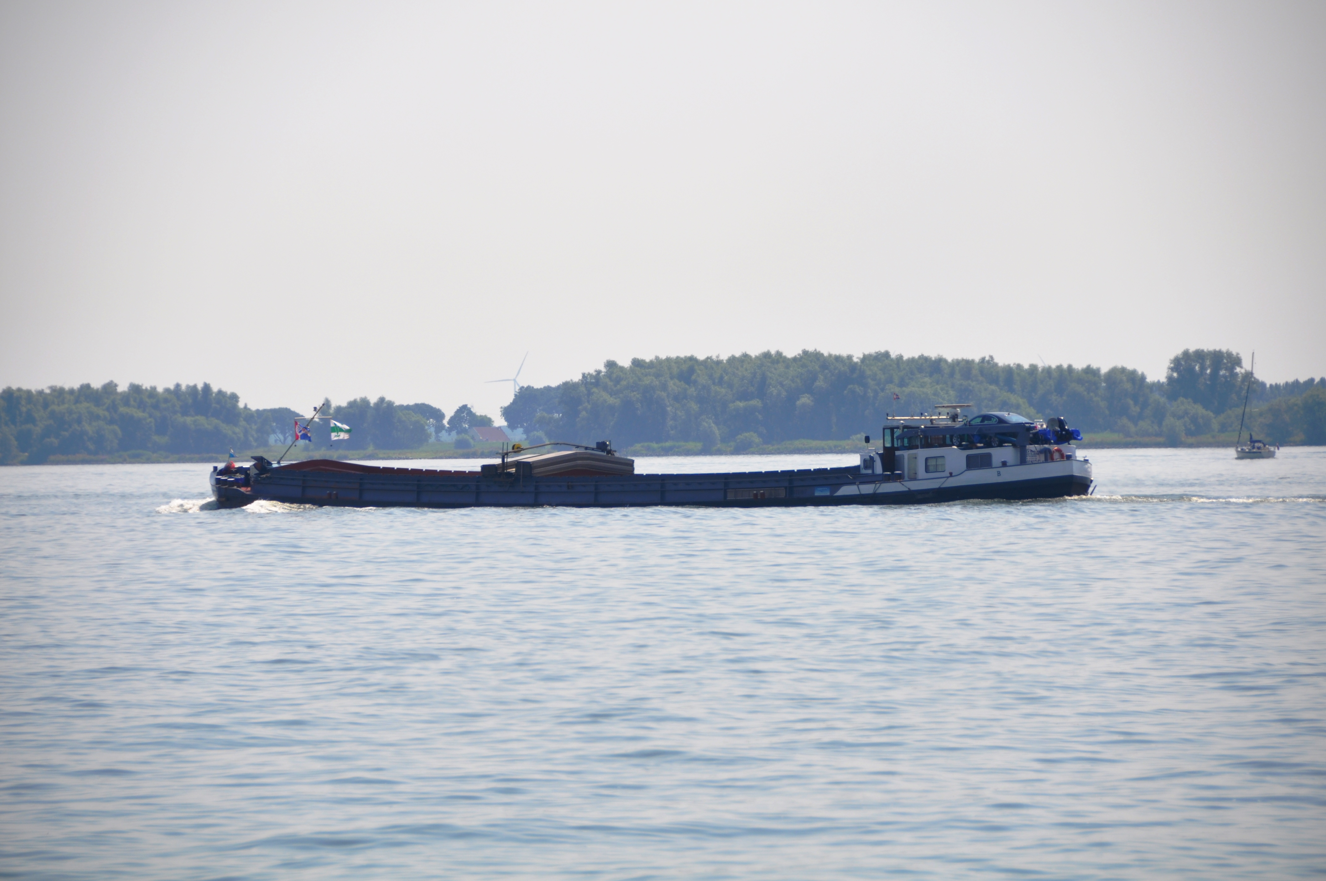 De SIRIUS in de opvaart op het Hollandsch Diep.